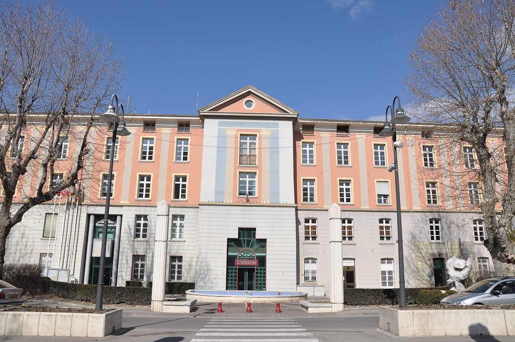 Atrium de Digne-les-Bains